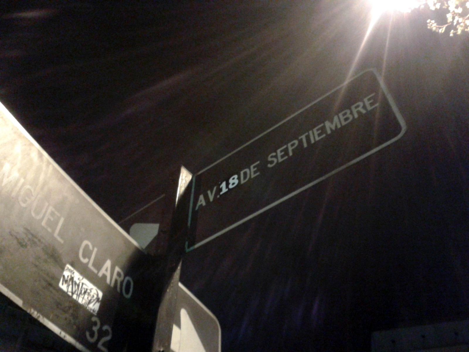 Letrero en la avenida 11 de Septiembre, Providencia, Santiago, intervenido para dejarlo en 18 de Septiembre (día de 1810 en que se constituyó la Primera Junta Nacional de Gobierno de Chile), en protesta al nombre de la calle que festejaba el golpe militar encabezado por el general Augusto Pinochet que derrocó al socialista Salvador Allende; la calle recobró en julio de 2013 su nombre orinal de Nueva Providencia.